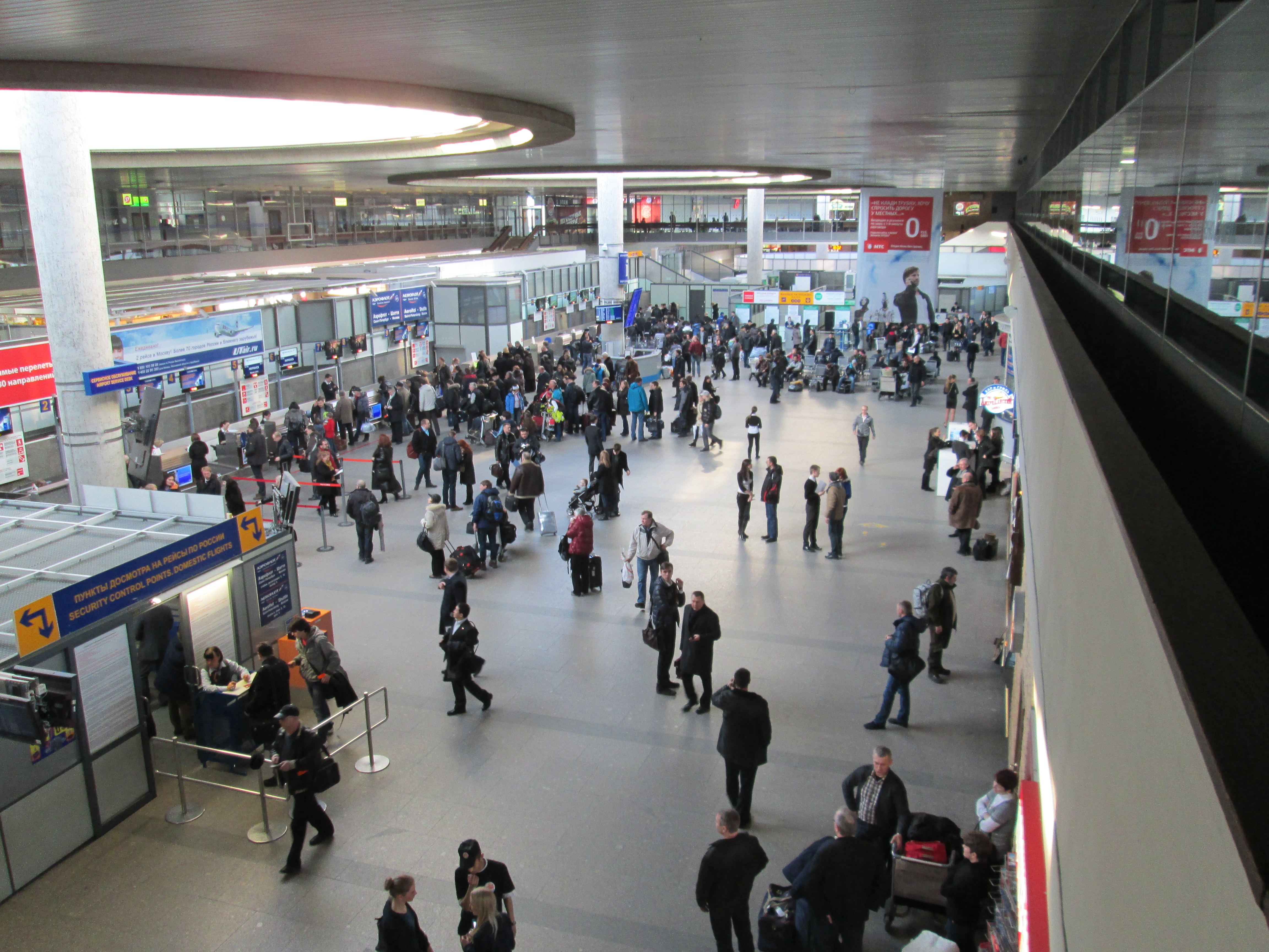 вид на зал регистрации в старом терминале пулково-1 в марте 2013